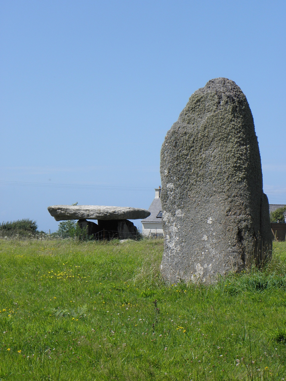 Le menhir et le dolmen de Kerivoret en Porspoder (29).